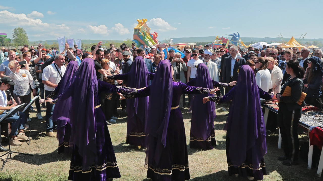 Празднование Хыдырлеза в Бахчисарайском районе Республики Крым